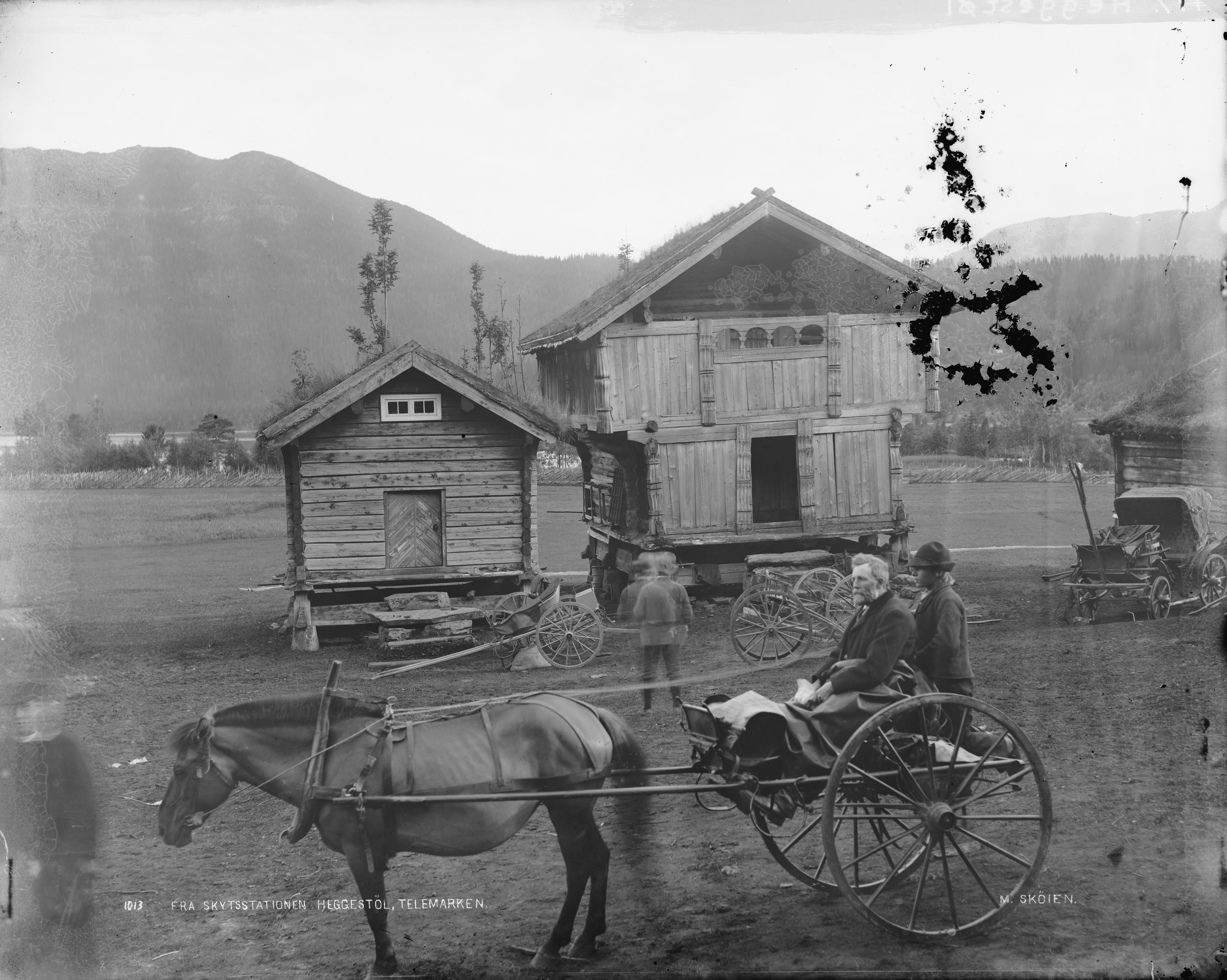 Påskrift negativ: 1013 Fra skytsstationen Heggestöl, Telemarken. M. Skøien Påskrift negativ: 177 Heggestøl [Riksantikvaren] Påskrift konvolutt: B-177 Heggjestøl skysstasjon [Riksantikvaren] Sted: Heggestøl Kommune: Vinje Fylke: Telemark Tagger: Heggestøl skysstasjon stabbur laftet bygning karjol hest og vogn